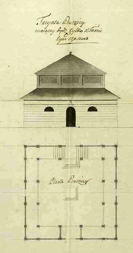 Plan Starej Synagogi w Kozienicach z 1782 roku Plan pochodzi ze zbiorów Archiwum Głównego Akt Dawnych